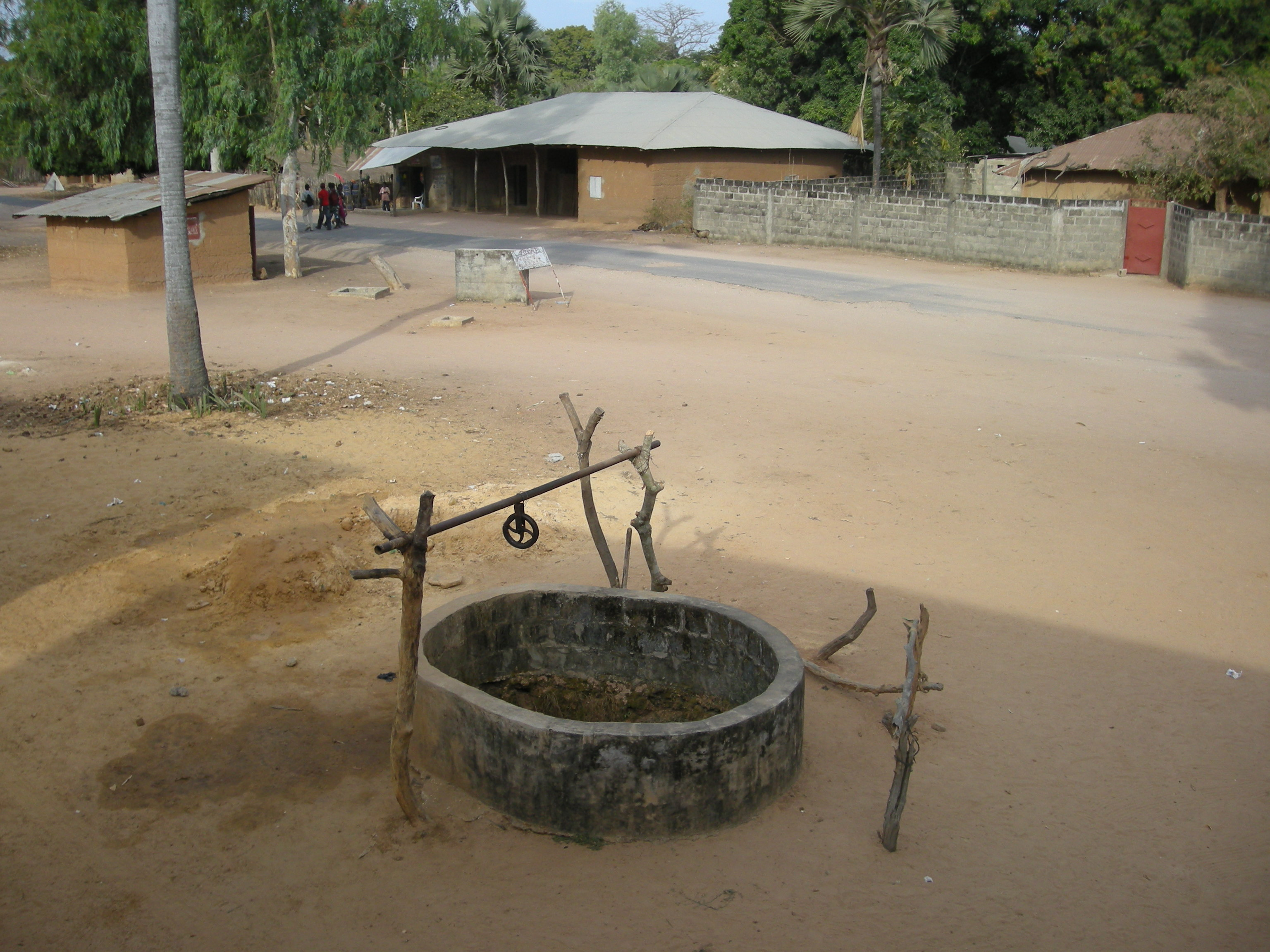 Puits à Mlomp (Casamance, Sénégal)